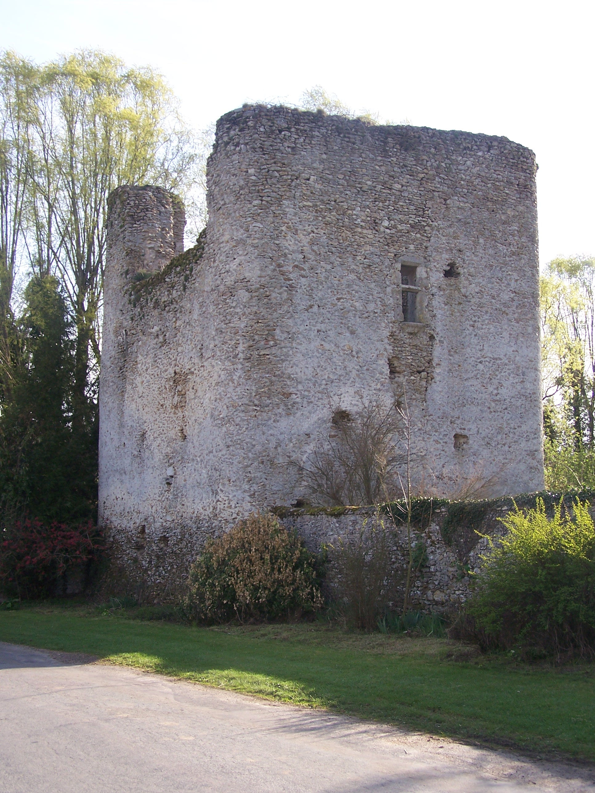 Ruines d'ancien château à Prunay-en-Yvelines, Yvelines, France